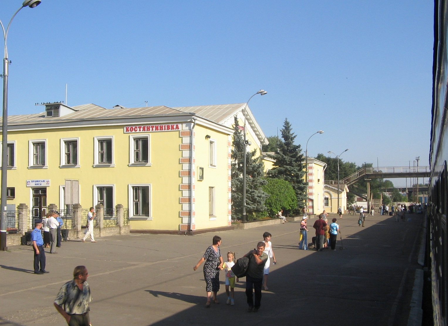 Вокзал міста Костянтинівка